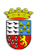 Escudo del concejo asturiano de Muros de Nalón